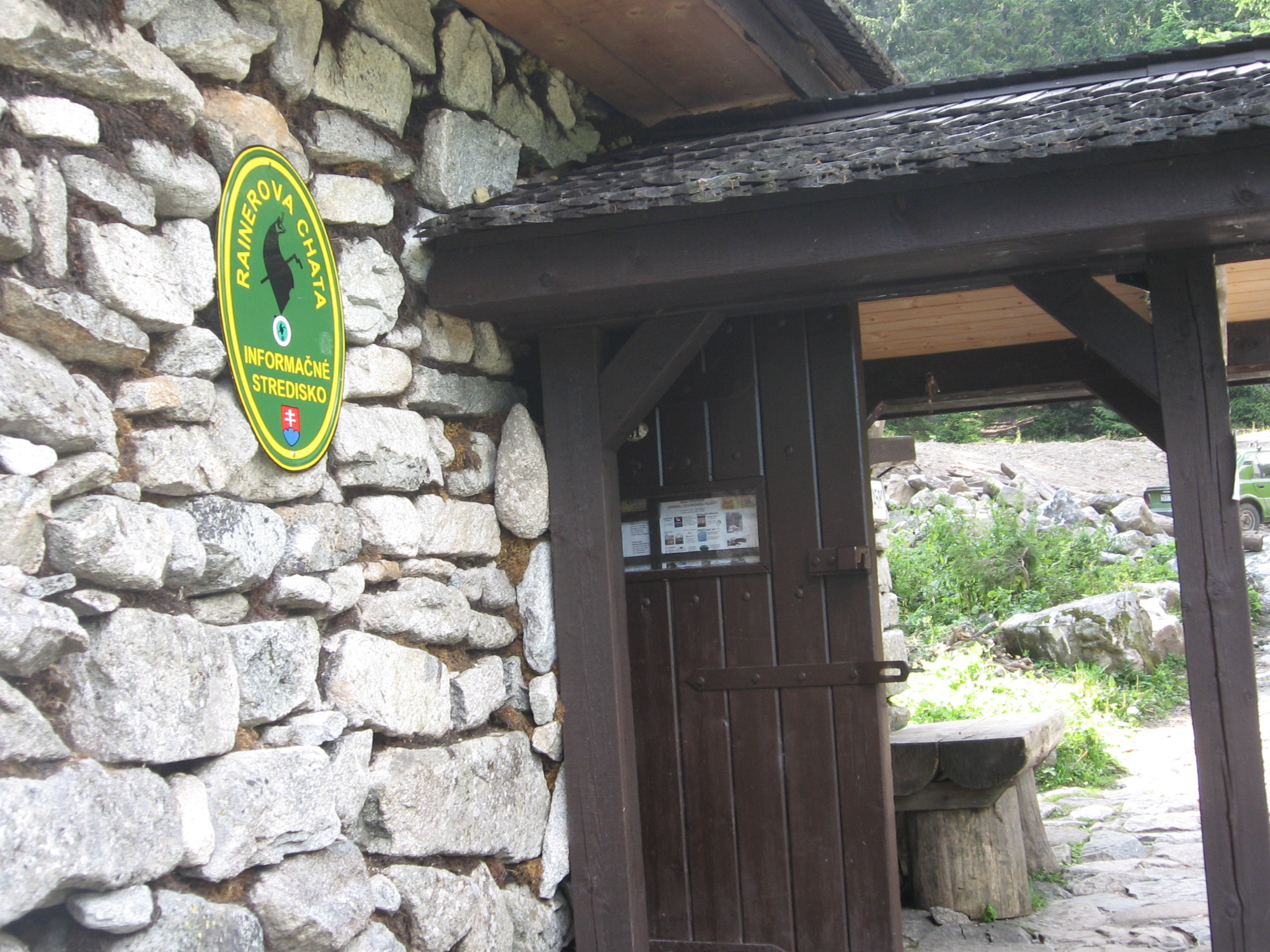 Rainerova chata (Rainerova útulňa) na Starolesnianskej poľane, najstaršia turistická chatka vo Vysokých Tatrách.